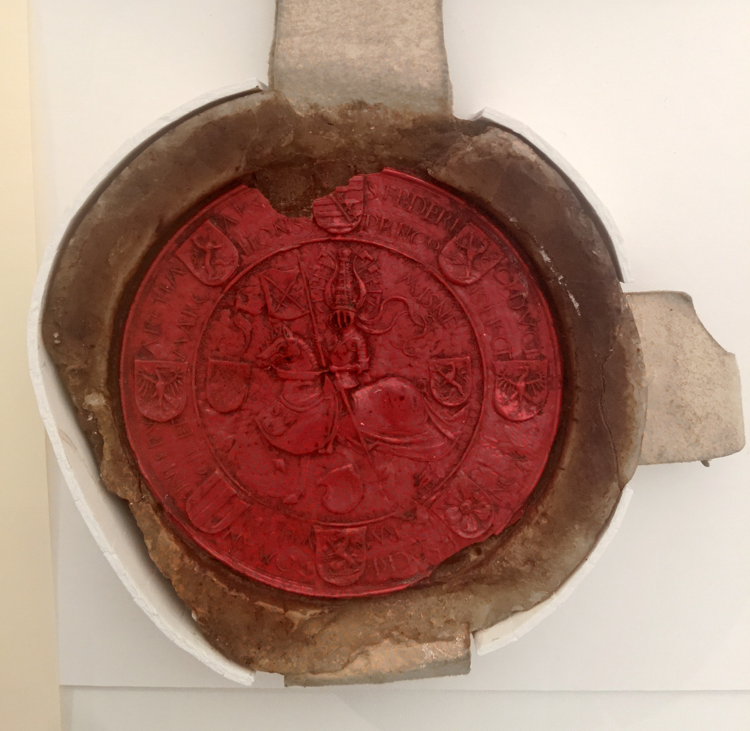 Siegel Friedrich der Weise von Sachsen an einer Urkunde mit der Stadt Herberg 1495